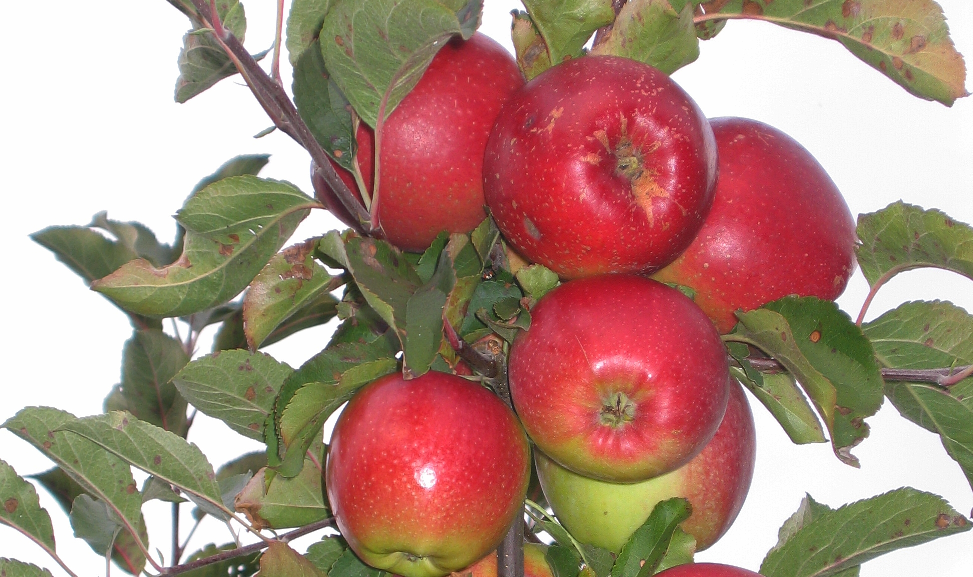 Odmiana jabłoni Ligol